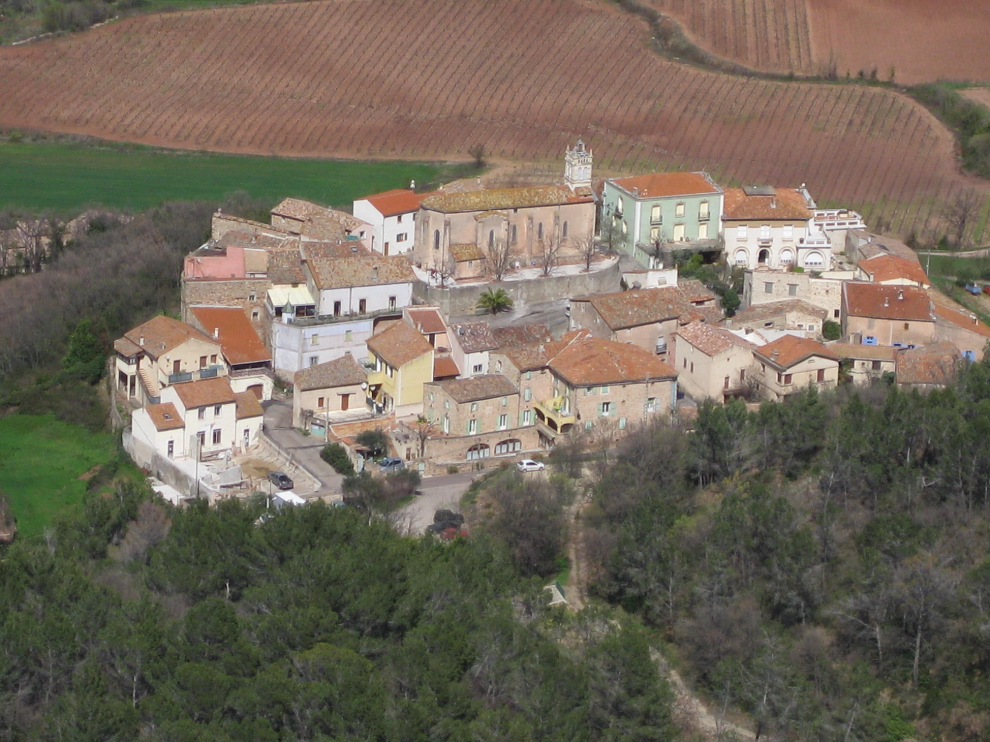 Le village de Liausson.